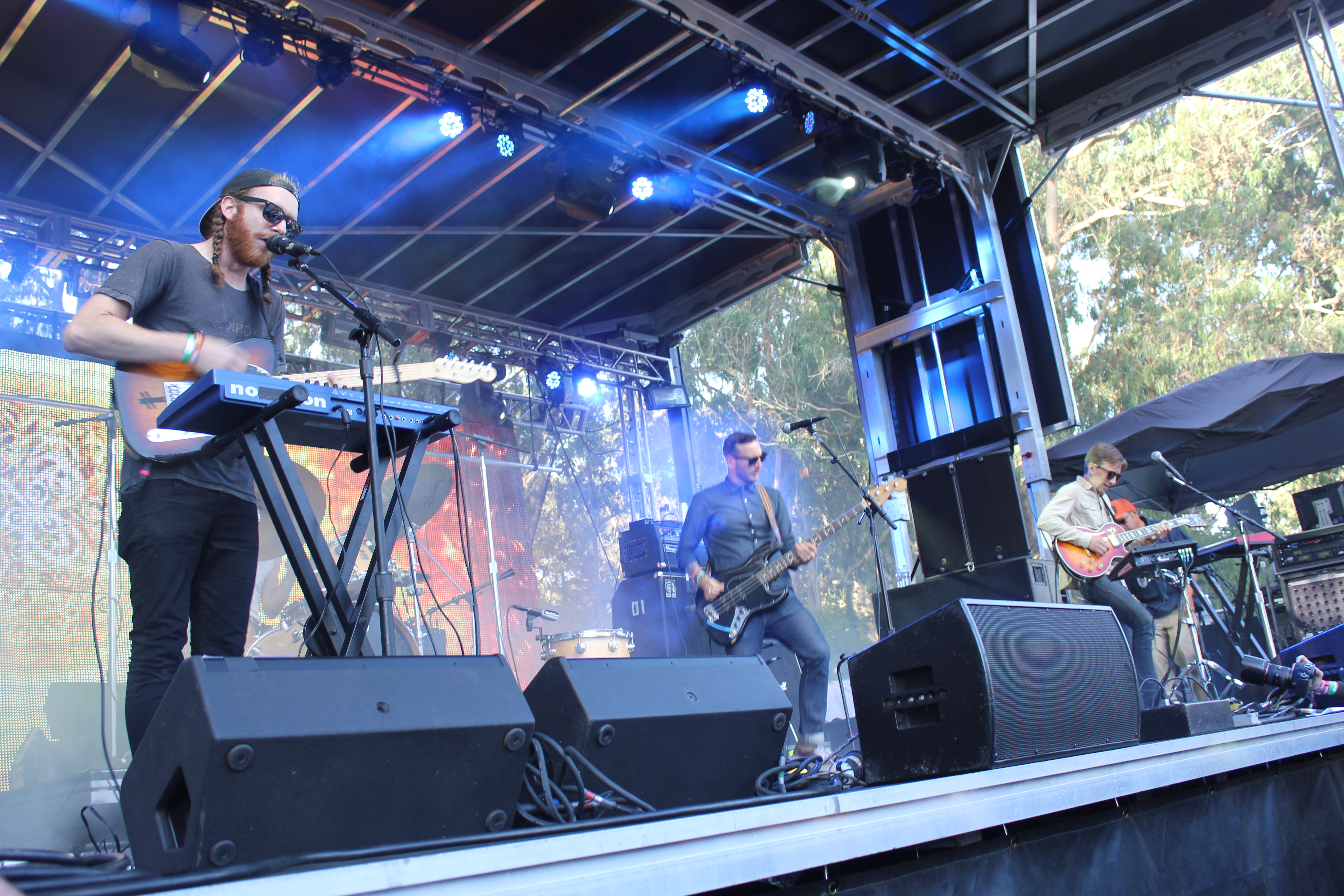 Bear Hands 2014